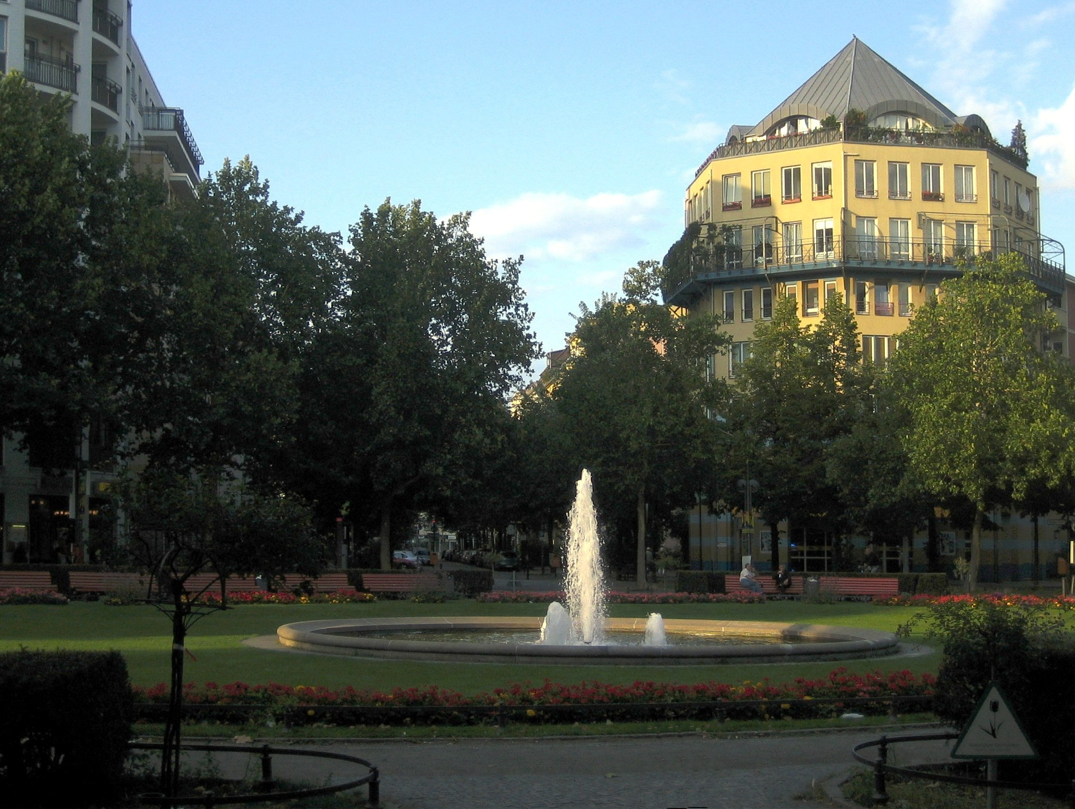 Der Prager Platz im Ortsteil Wilmersdorf des Berliner Bezirks Charlottenburg-Wilmersdorf. Blick nach Nordosten.